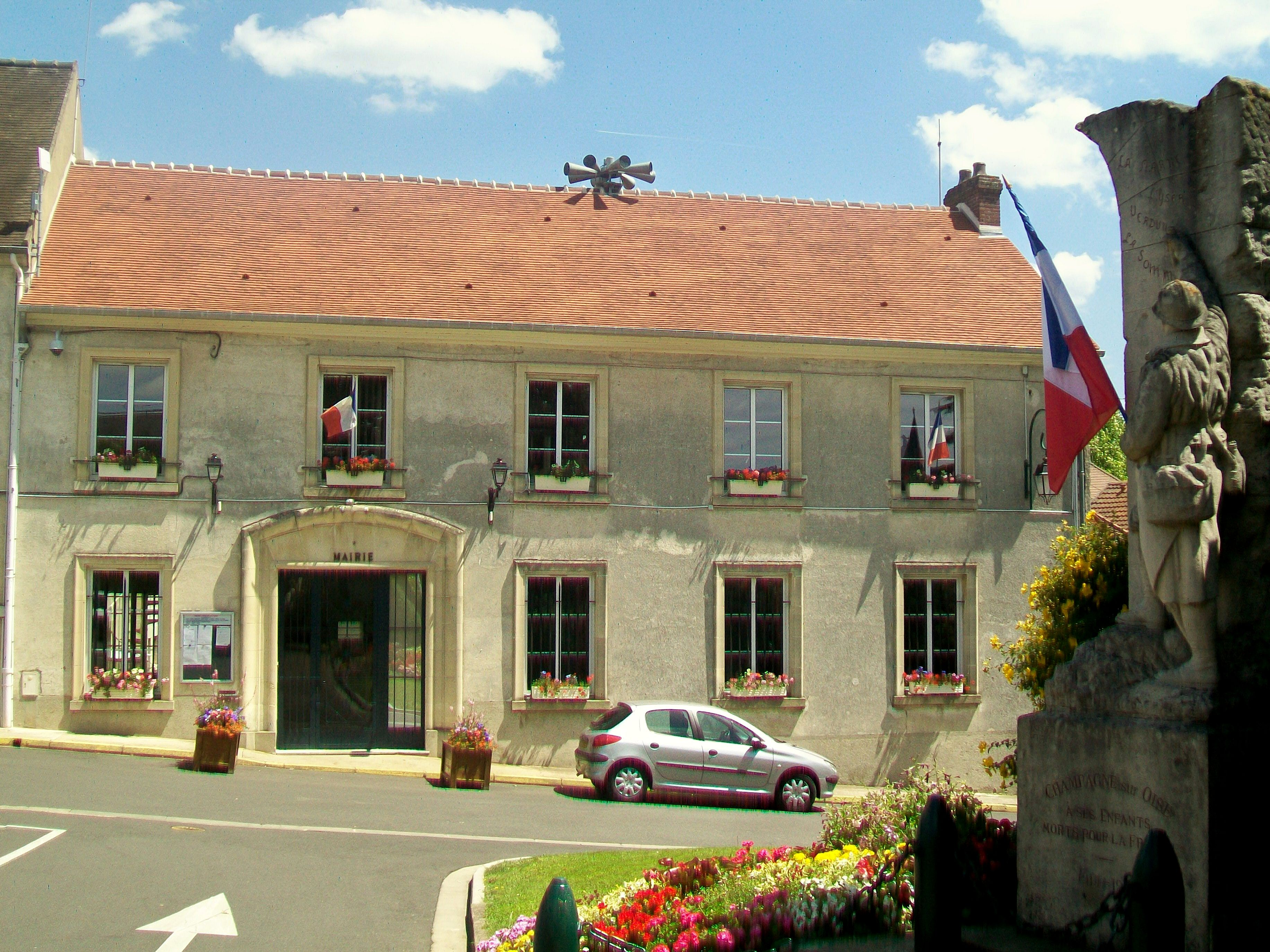 Mairie et monument aux morts de 1922, place du général de Gaulle.